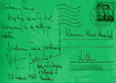 Carte Postale de Stefan Askenase.